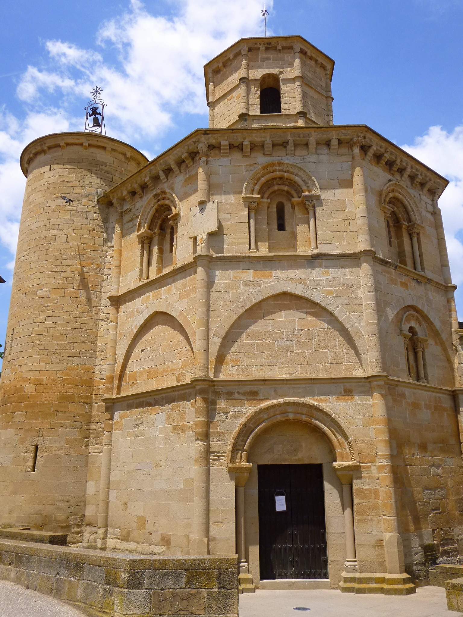 Torres del Río - Iglesia del Santo Sepulcro